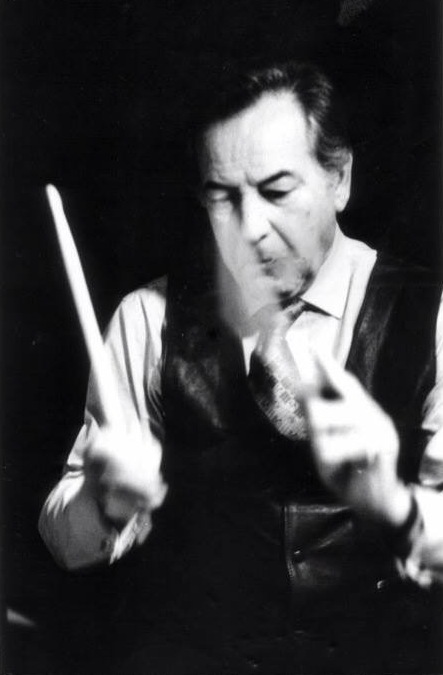 Alberto Alberti